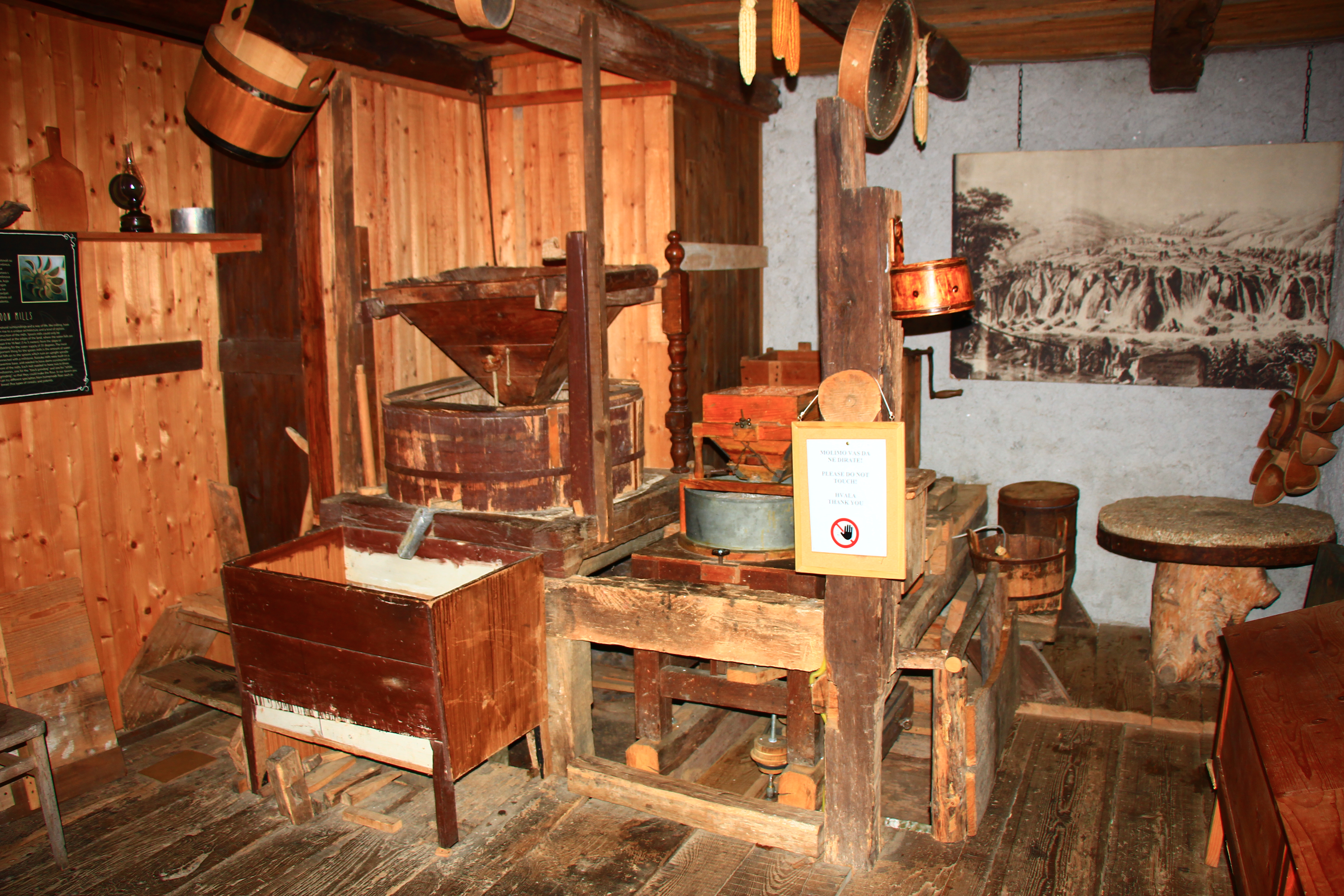 Rastoke mit seinen Wasserfälllen, Teil der Stadt Slunj in Kroatien